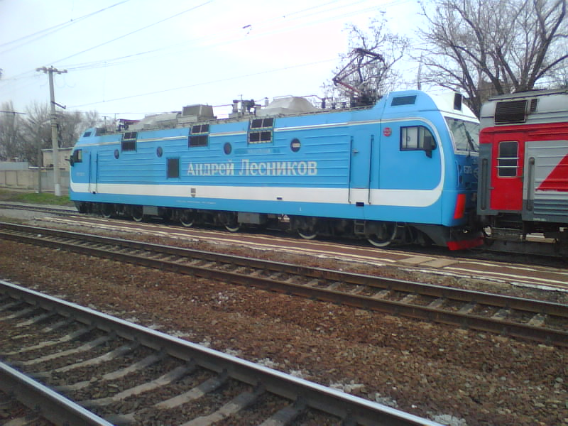 Электровоз ЭП1М-678 "Андрей Лесников" на станции Каменская, вид сбоку